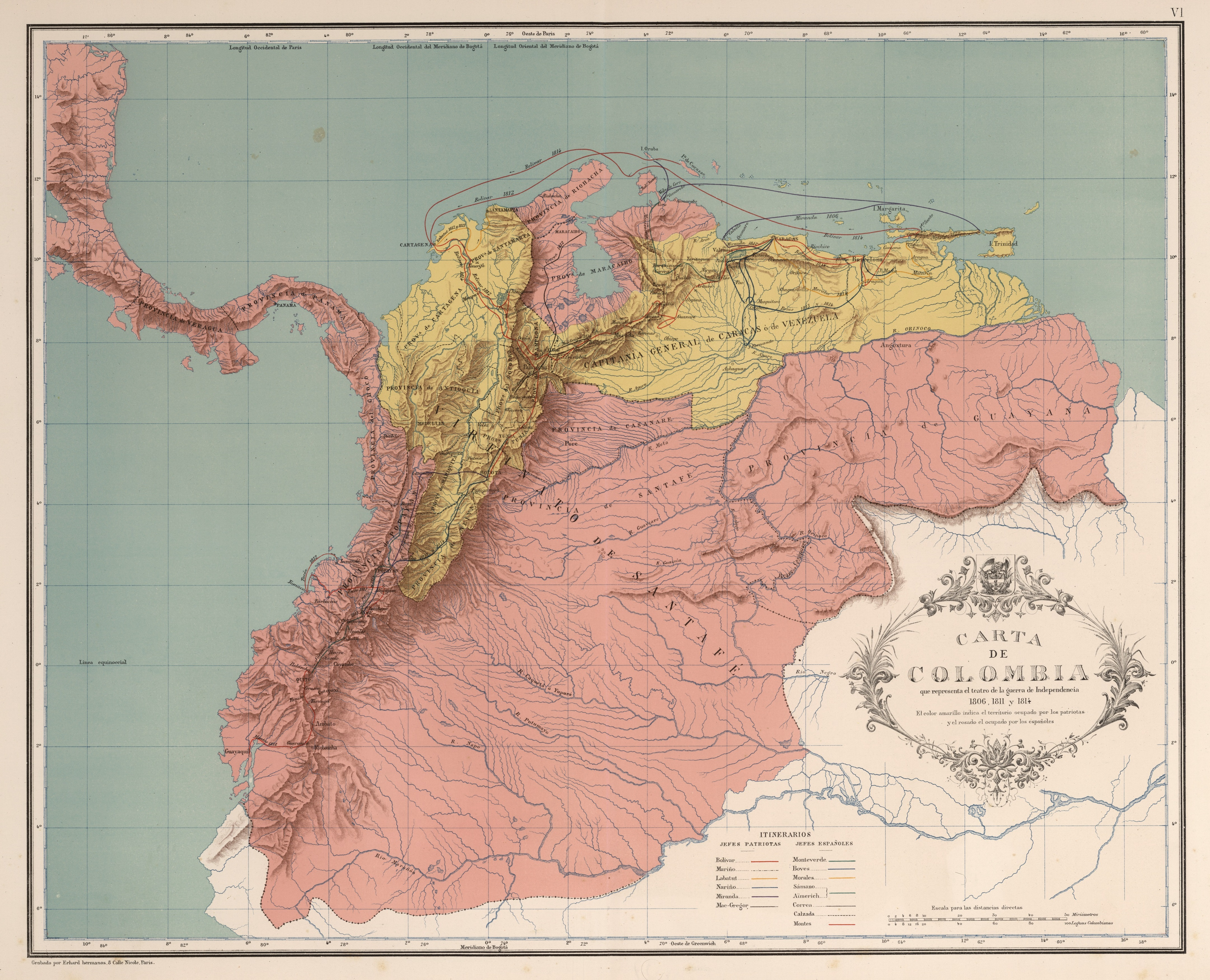 Carta que representa el teatro de independencia años 1806, 1811 y 1814. Carta VI del Atlas geográfico e histórico de la República de Colombia, 1890.